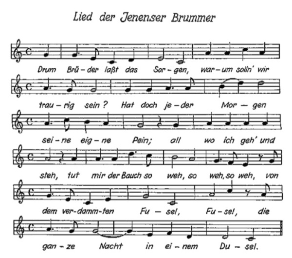 Lied der Jenaer Inaktivenvereinigung Neobrummkrakelia